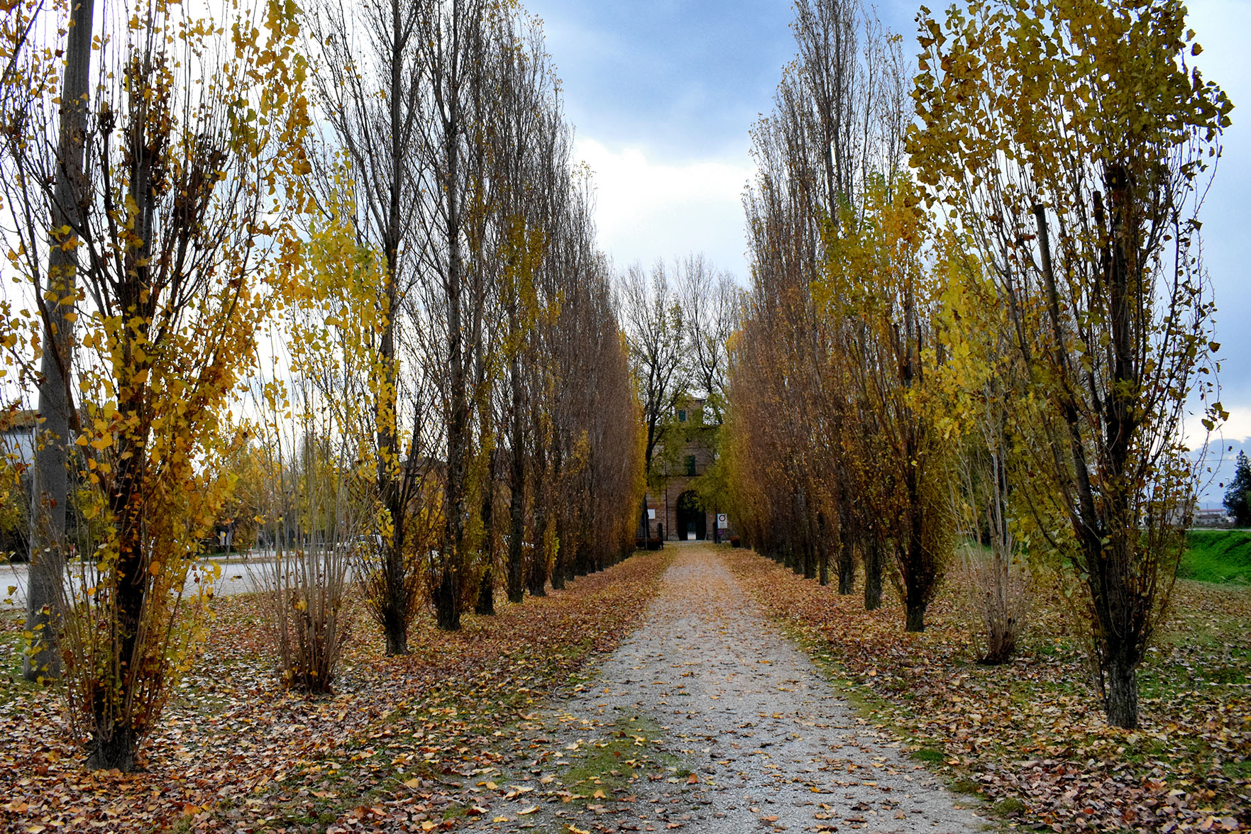 Villa Torlonia This is a photo of a monument which is part of cultural heritage of Italy.